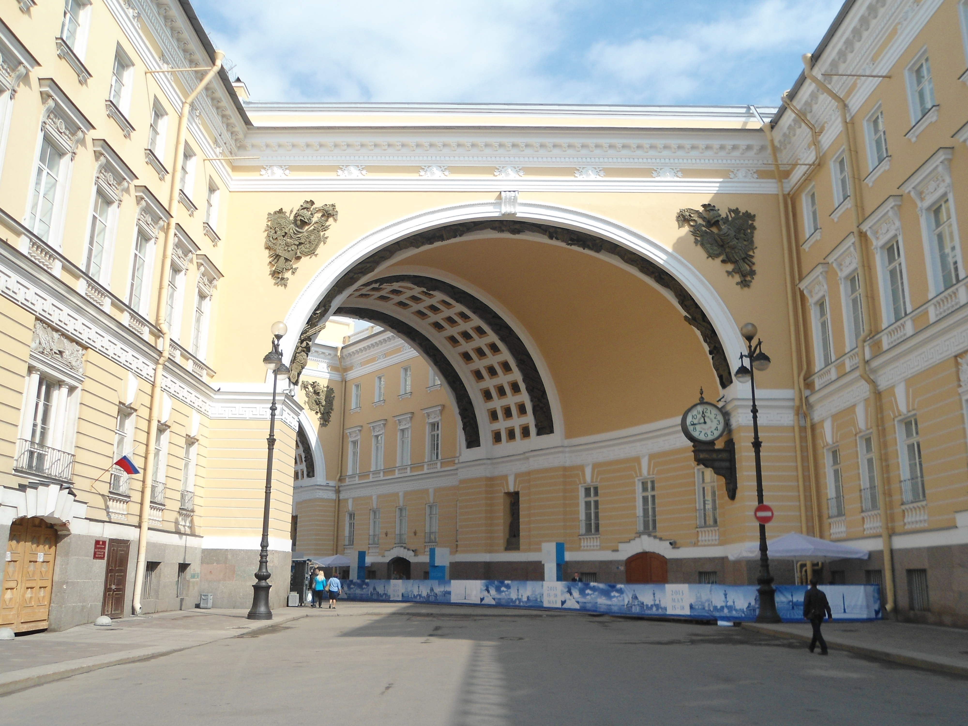 Arch